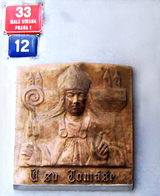 Барельєф біля входу в ресторан "У святого Томаша" і афішка з номером будинку (адресою ресторана).